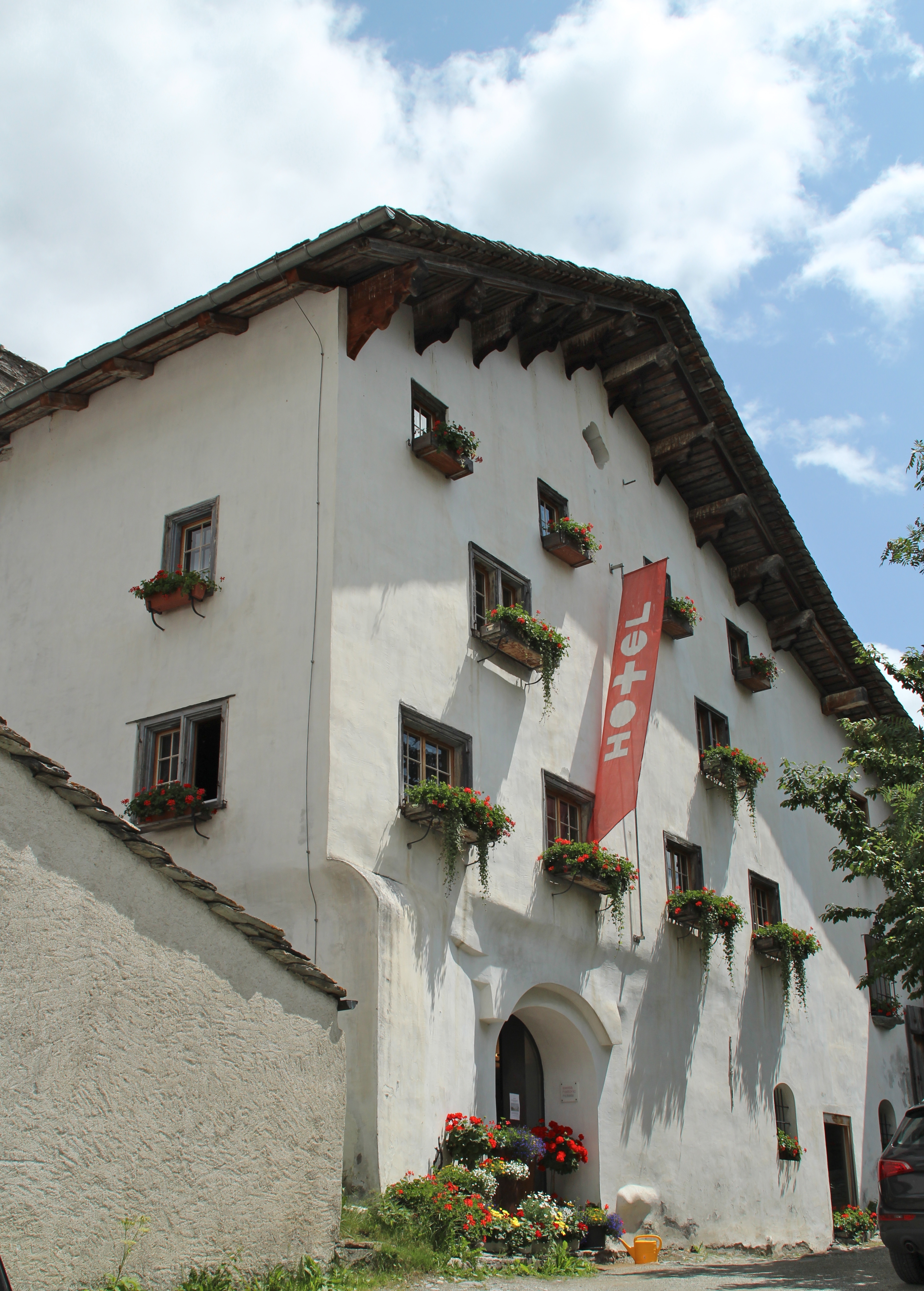 Hotel Weiss Kreuz, rechts des Stutzbaches